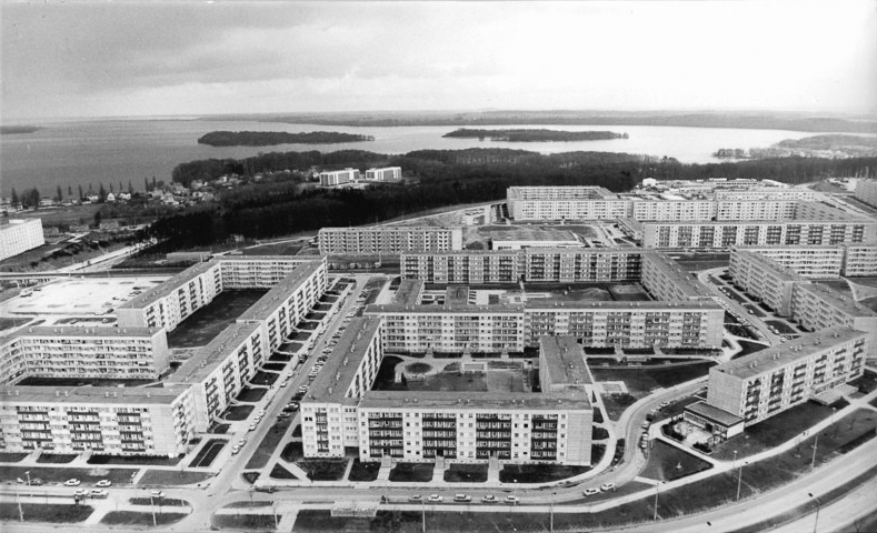 Schwerin, Großer Dreesch, Wohnungsbau ADN-ZB Pätzold-7.6.1985-pre-Schwerin: Wohnungsbau-Blick vom Fernsehturm im Jahre 1985: Auf dem Schweriner Großen Dreesch, dem größten Neubaugebiet des mecklenburgischen Bezirkes, erhielten seit der Grundsteinlegung im November 1971 rund 44000 Bürger ein neues Zuhause. In dem in unmittelbarer Näh des zweitgrößten Binnensees der DDR gelegenen Wohngebiet wurden außerdem zahlreiche gesellschaftliche Einrichtungen, darunter 17 Schulen, 18 Kinderkombinationen, sechs Kaufhallen, zwei Jugendklubs, geschaffen. Für jeden zweiten der 125000 Einwohner des 825jährigen Schwerins verbesserten sich seit dem VIII. Parteitel der SED die Wohnbedingungen wesentlich. -siehe auch 1985-0607-7N- Information added by Wikimedia users.Berichtigung: ADN-ZB Pätzold-7.6.1985-pre-Schwerin: Wohnungsbau-Blick vom Fernsehturm im Jahre 1985: Auf dem Schweriner Großen Dreesch, dem größten Neubaugebiet des mecklenburgischen Bezirkes, erhielten seit der Grundsteinlegung im November 1971 rund 44000 Bürger ein neues Zuhause. In dem in unmittelbarer Nähe des zweitgrößten Binnensees der DDR gelegenen Wohngebiet wurden außerdem zahlreiche gesellschaftliche Einrichtungen, darunter 17 Schulen, 18 Kinderkombinationen, sechs Kaufhallen, zwei Jugendklubs, geschaffen. Für jeden zweiten der 125000 Einwohner des 825jährigen Schwerins verbesserten sich seit dem VIII. Parteitag der SED die Wohnbedingungen wesentlich. -siehe auch 1985-0607-7N- Zusatz: Im Hintergrund: der Schweriner See mit den Inseln Kaninchenwerder und Ziegelwerder